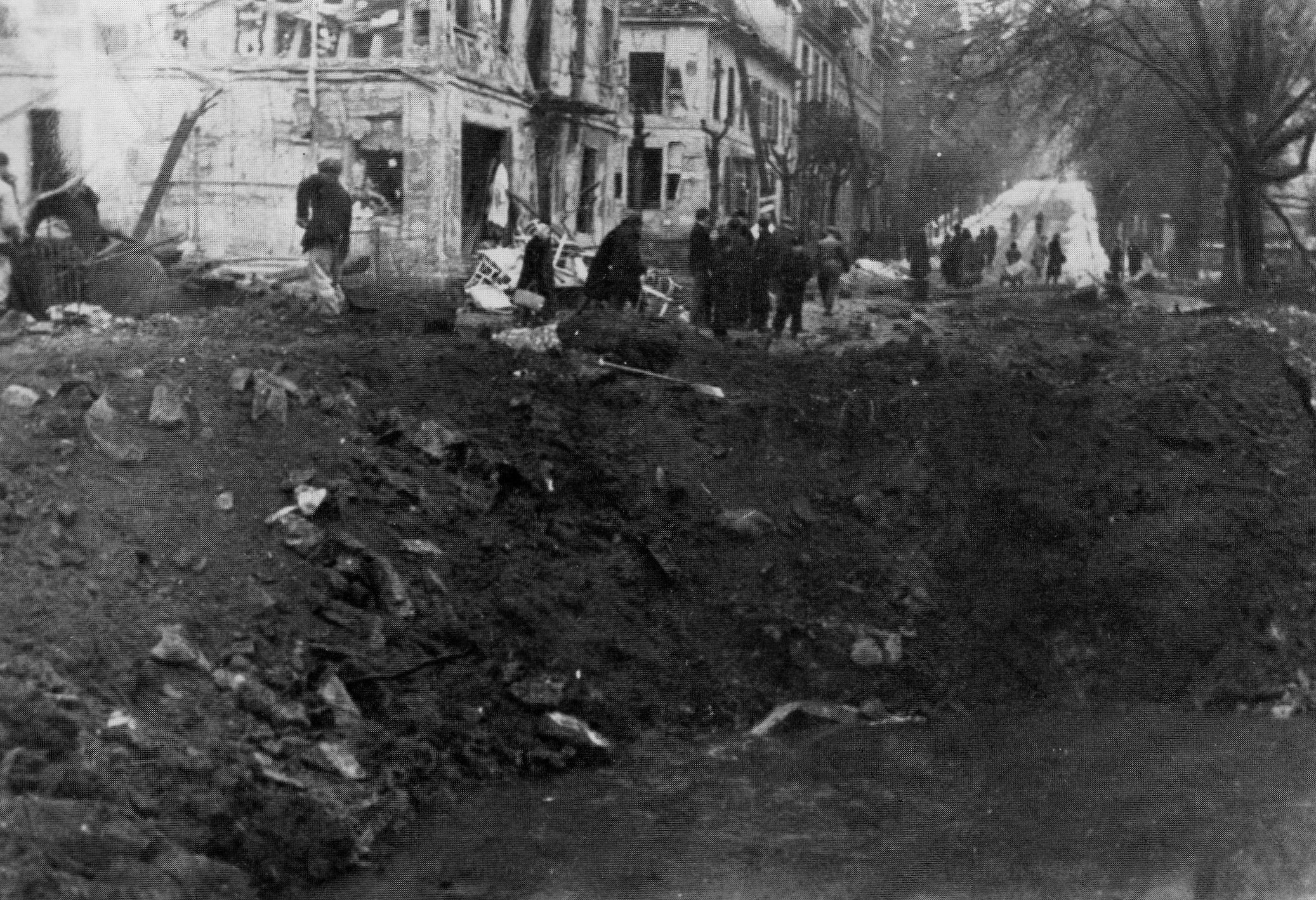 Bombeneinschlag an der Königsteiner Kirche (rechts Kurpark und links heutiger Standort des Rathauses)